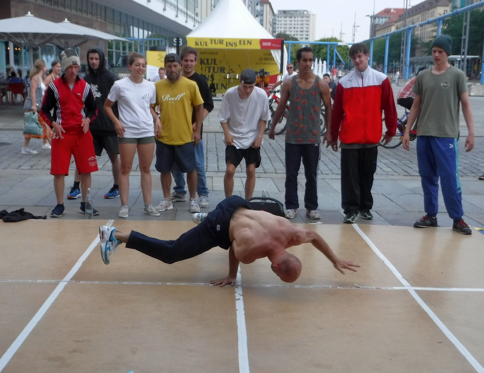 The Saxonz bei den Dresdner Kulturinseln 2020. Auf der Bühne: Philip "Lehmi" Lehmann